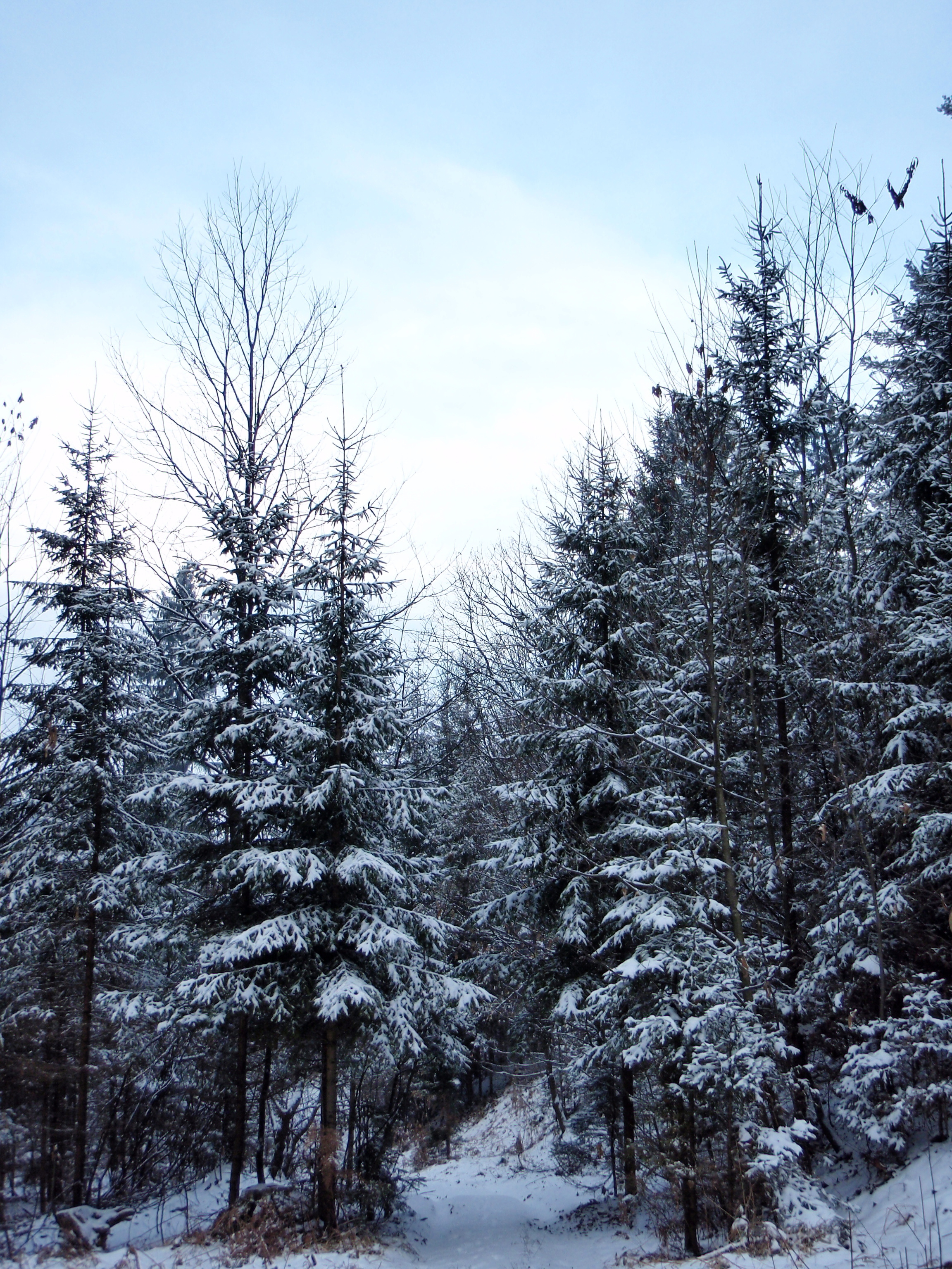 Picea abies